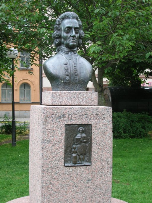 Emanuel Swedenborg at Mariatorget Square, Stockholm, Sweden.